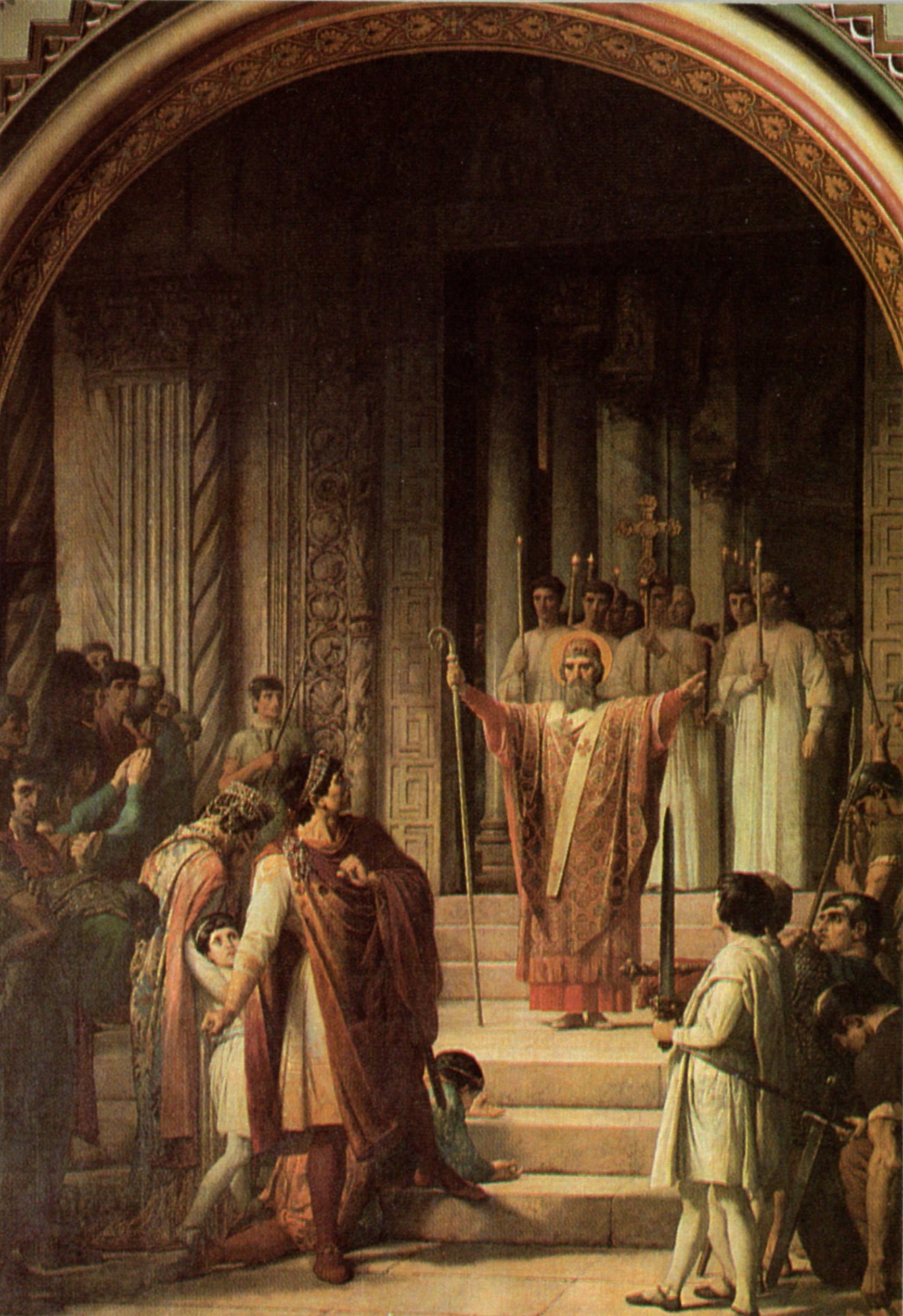 Eglise de Saint-Ambroise - Paris 11e: peinture de Jules Lenepveu - Saint Ambroise interdisant l'entrée de l'église de Milan à l'empereur Théodose, coupable du meurtre des habitants de Thessalonique en 390.